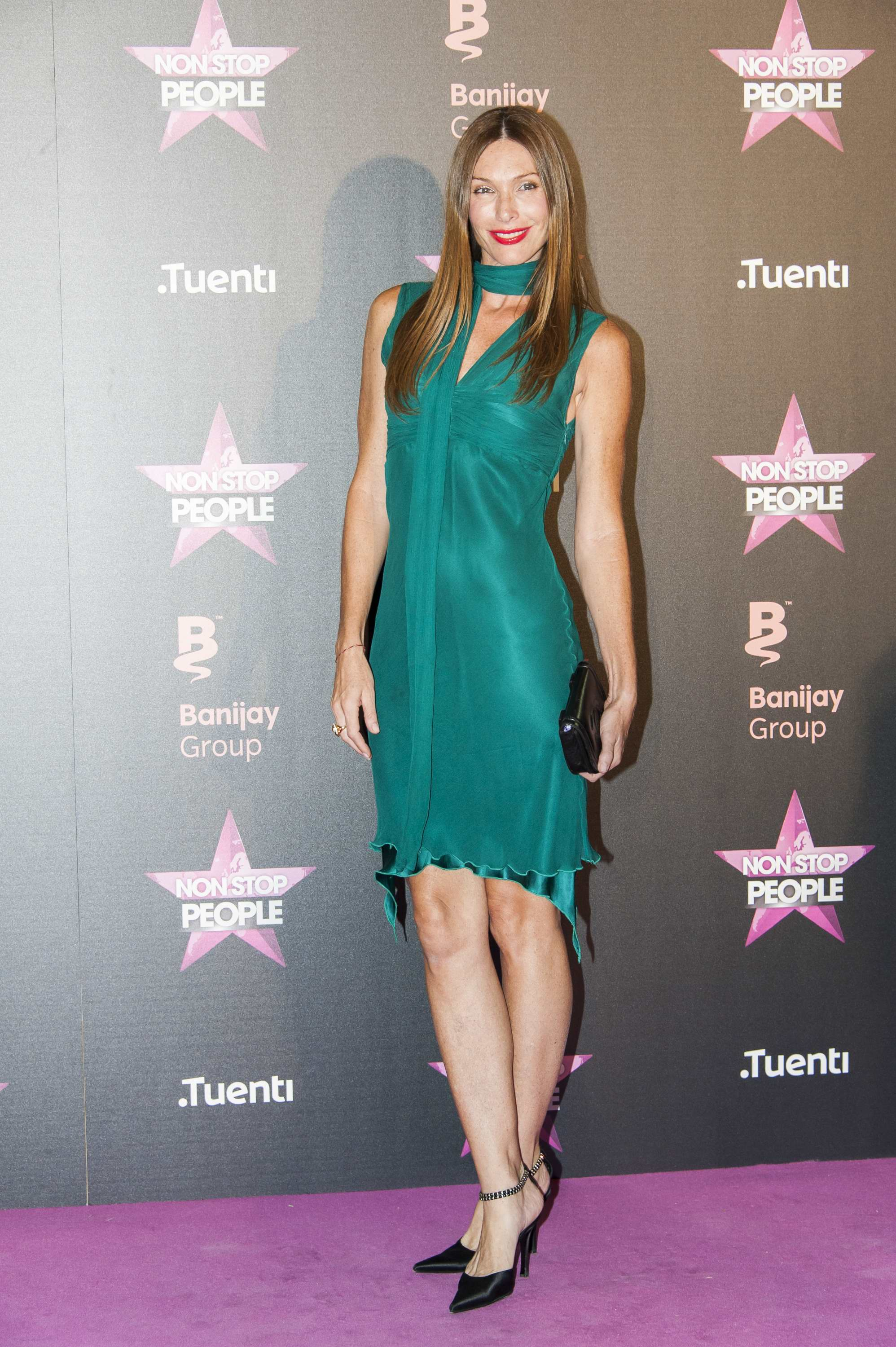 La modelo española Cristina Piaget en septiembre de 2015.